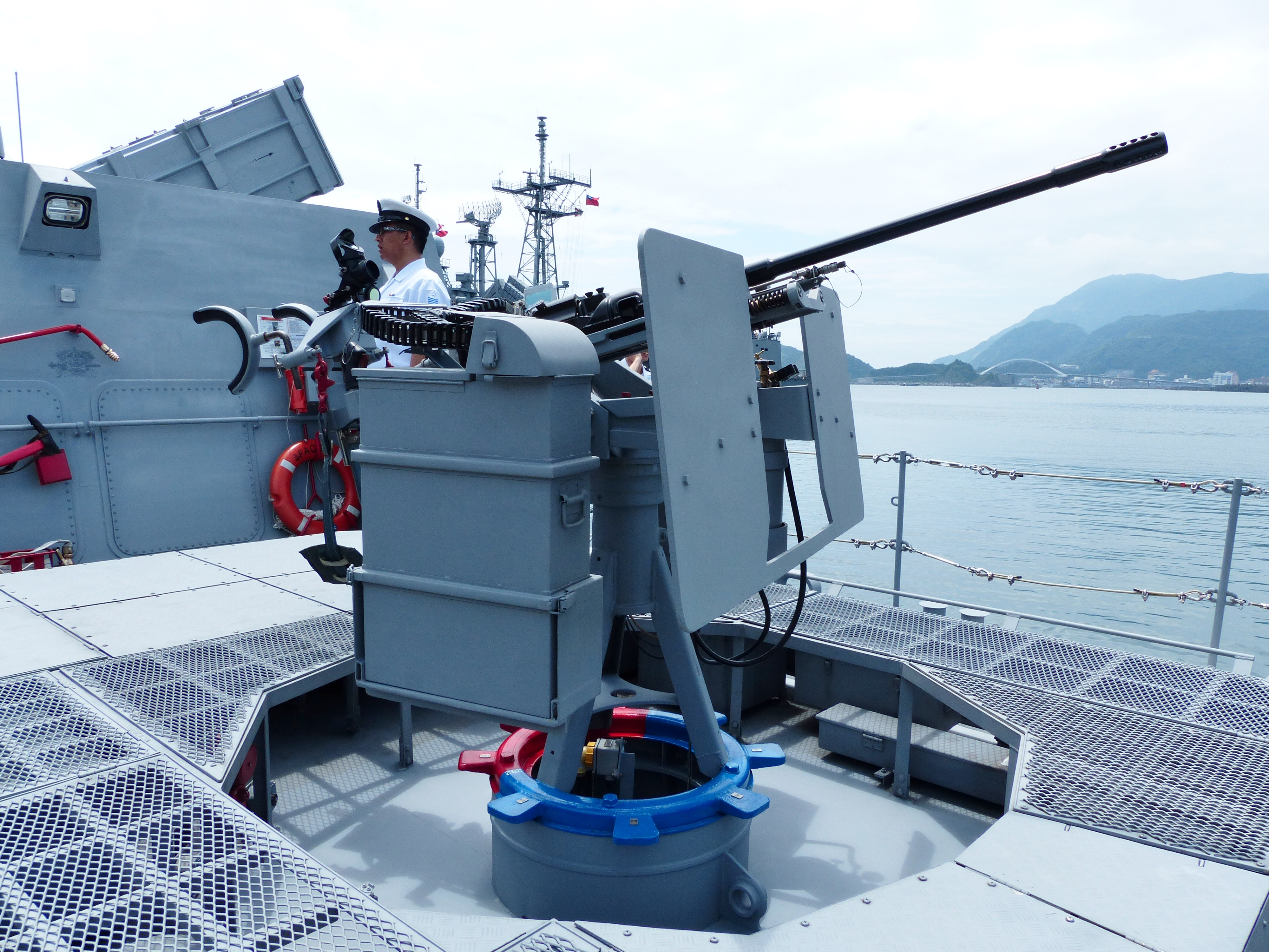 光華六號飛彈快艇FACG-77後部搭載的T-75S 20mm機關砲右前方，攝於2013年中正軍港營區開放活動。